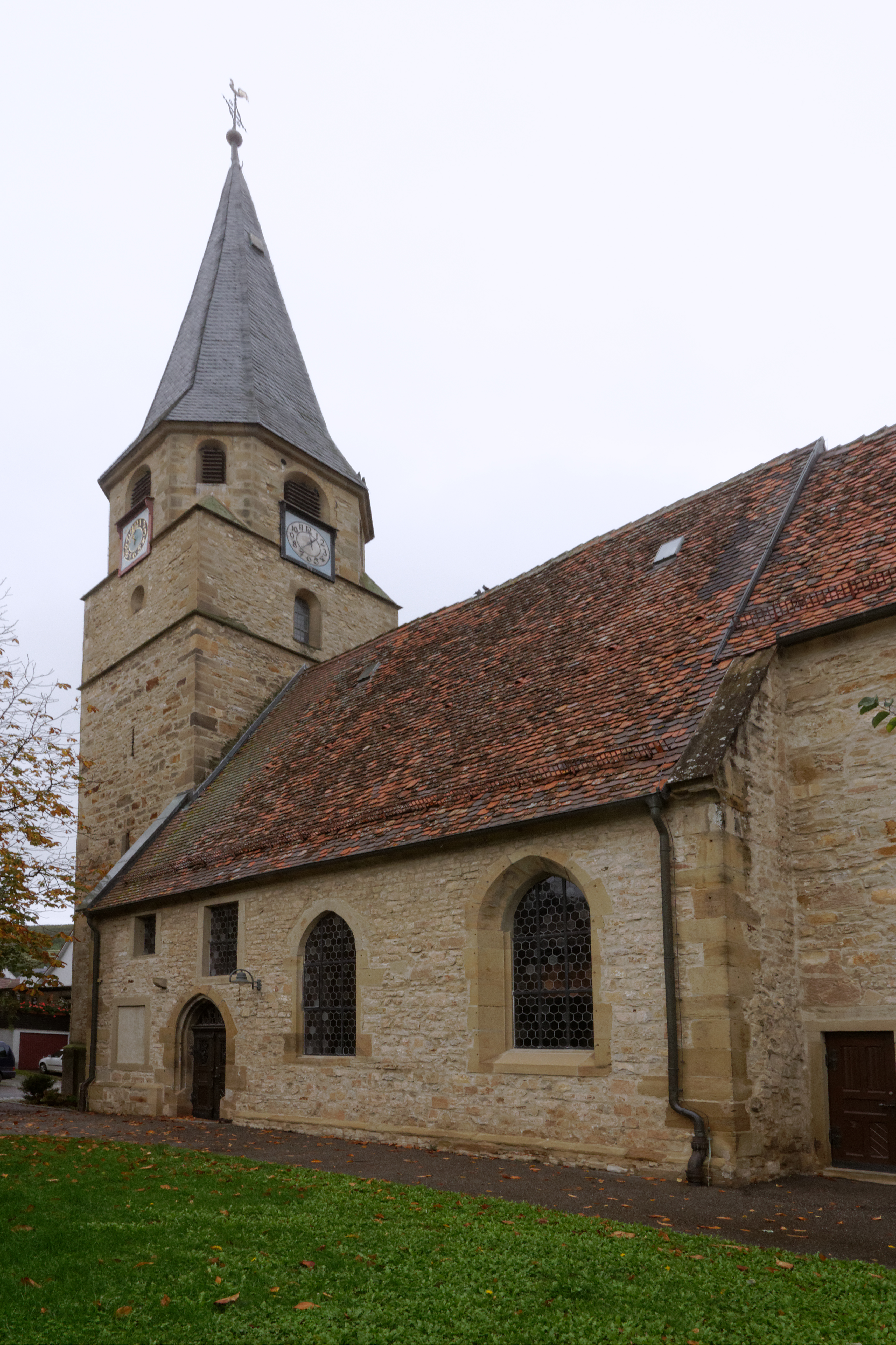 Evangelische Kirche St. Martin in Roßwag, einem Stadtteil von Vaihingen an der Enz.